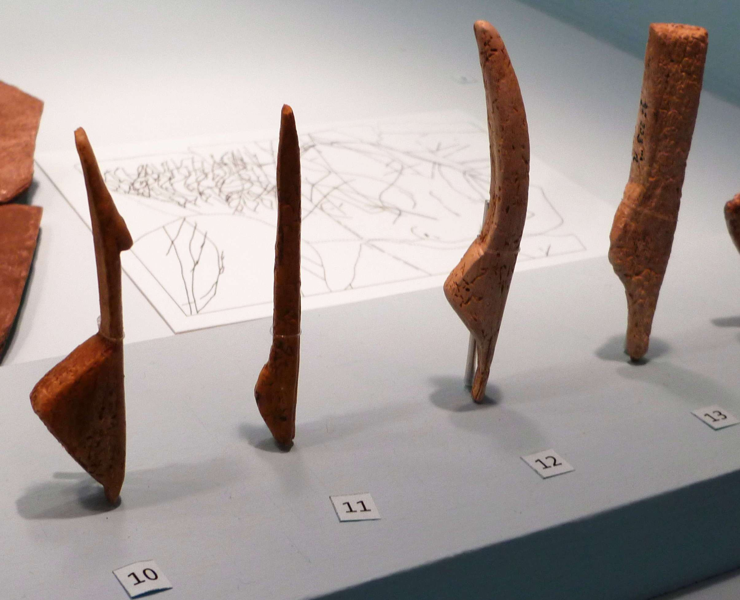 Fotografiert im LVR Landesmuseum Bonn. Das Foto zeigt Kopien von Nr.:10 Figurine aus Knochen Nr.:11 Figurine aus Geweih Nr.: 12 Figurine aus Elfenbein Nr.:13 unvollständige Figurin aus Geweih.